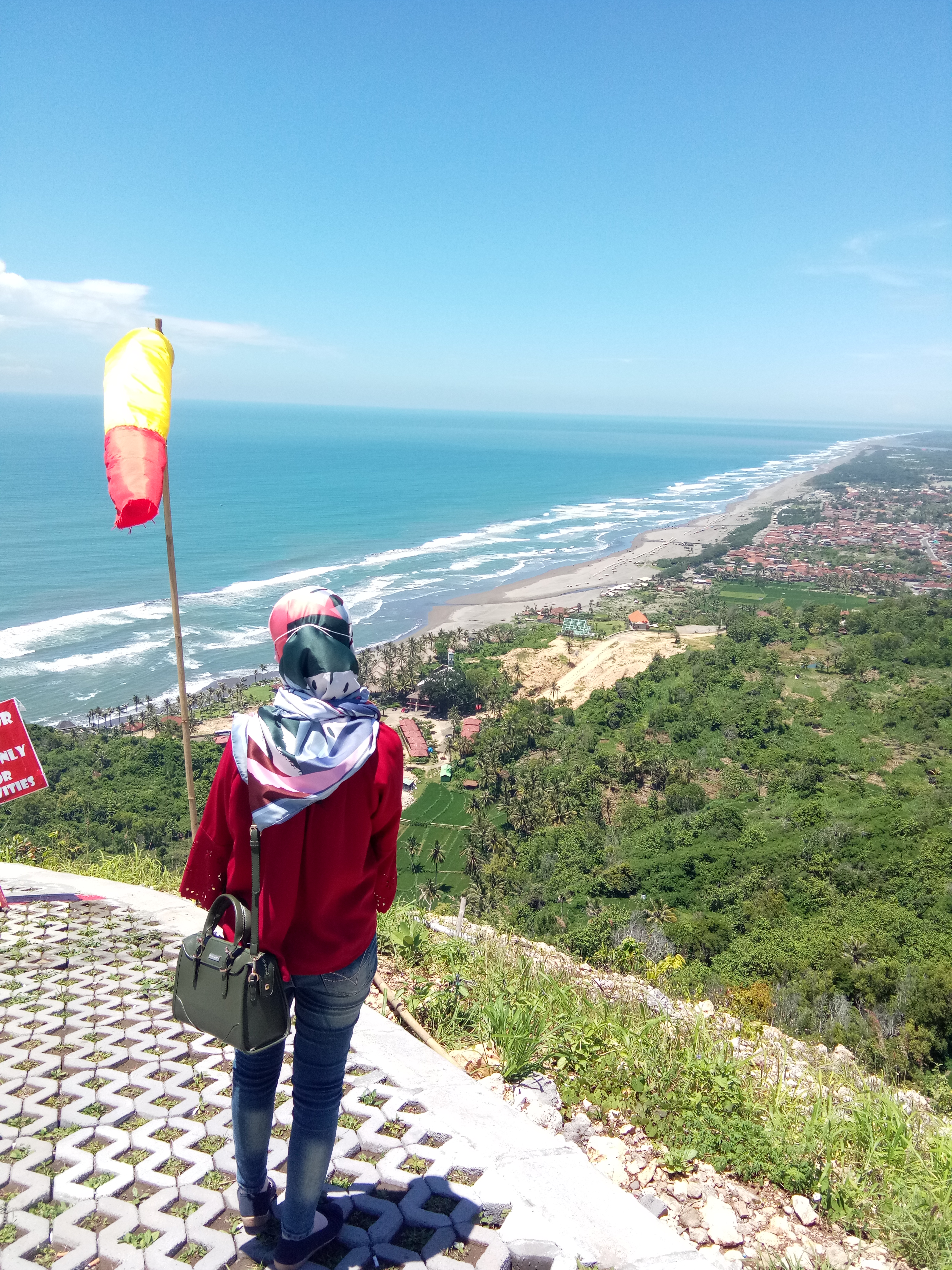 Jawa: gambar punika dipunpendhet saking papan panggenan wisata puncak paralayang, Gunung Kidul